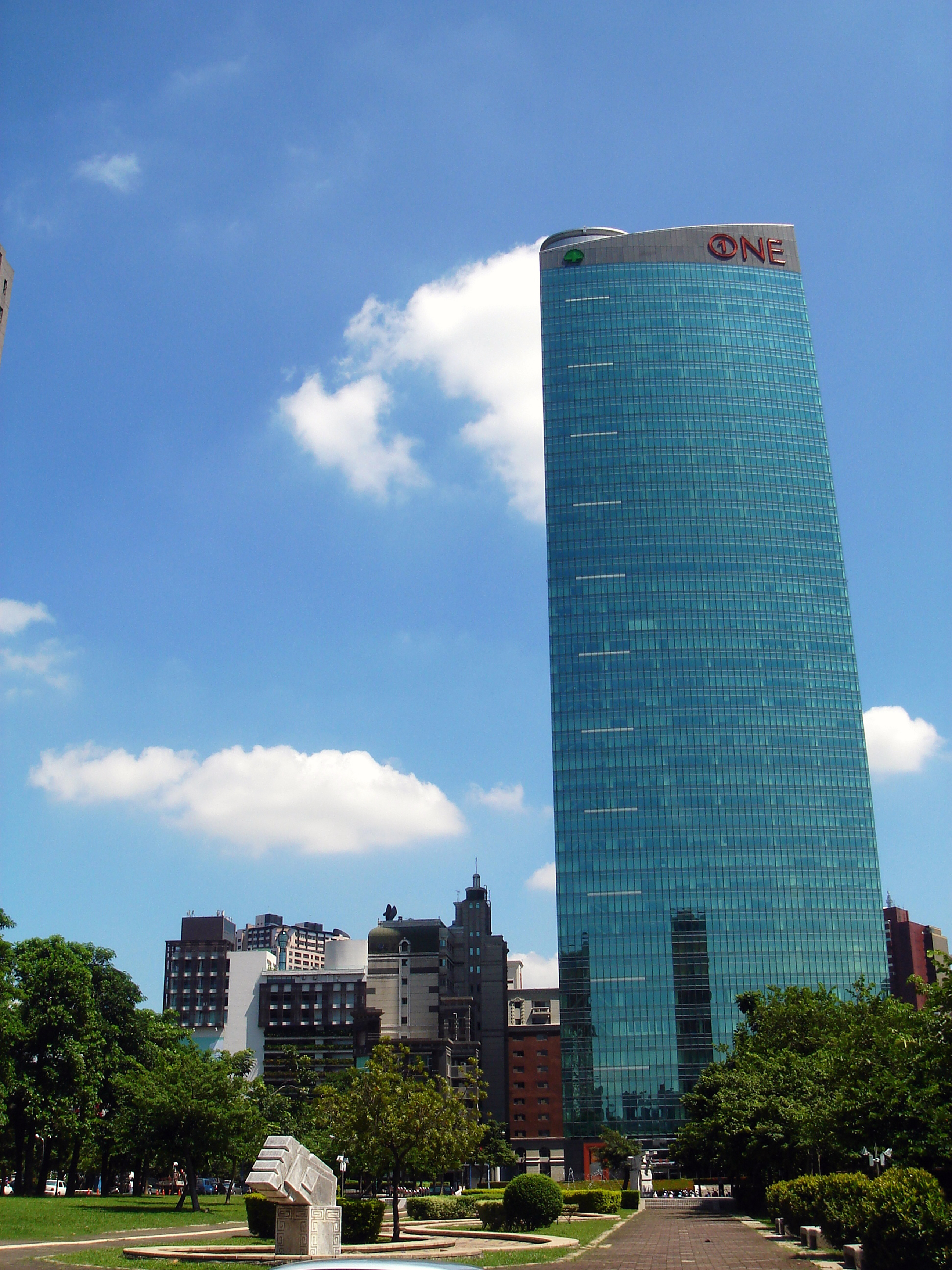 臺中市世華國際大樓與經國園道。